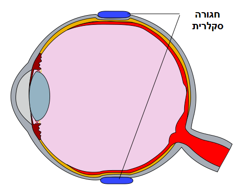 חגורת סיליקון (חגורת סקלרה, בכחול) נתפרת במהלך הניתוח סביב גבולות לובן העין, ובכך מביא את דופן העין במגע עם הרשתית המופרדת, דבר המאפשר לרשתית להתחבר מחדש.